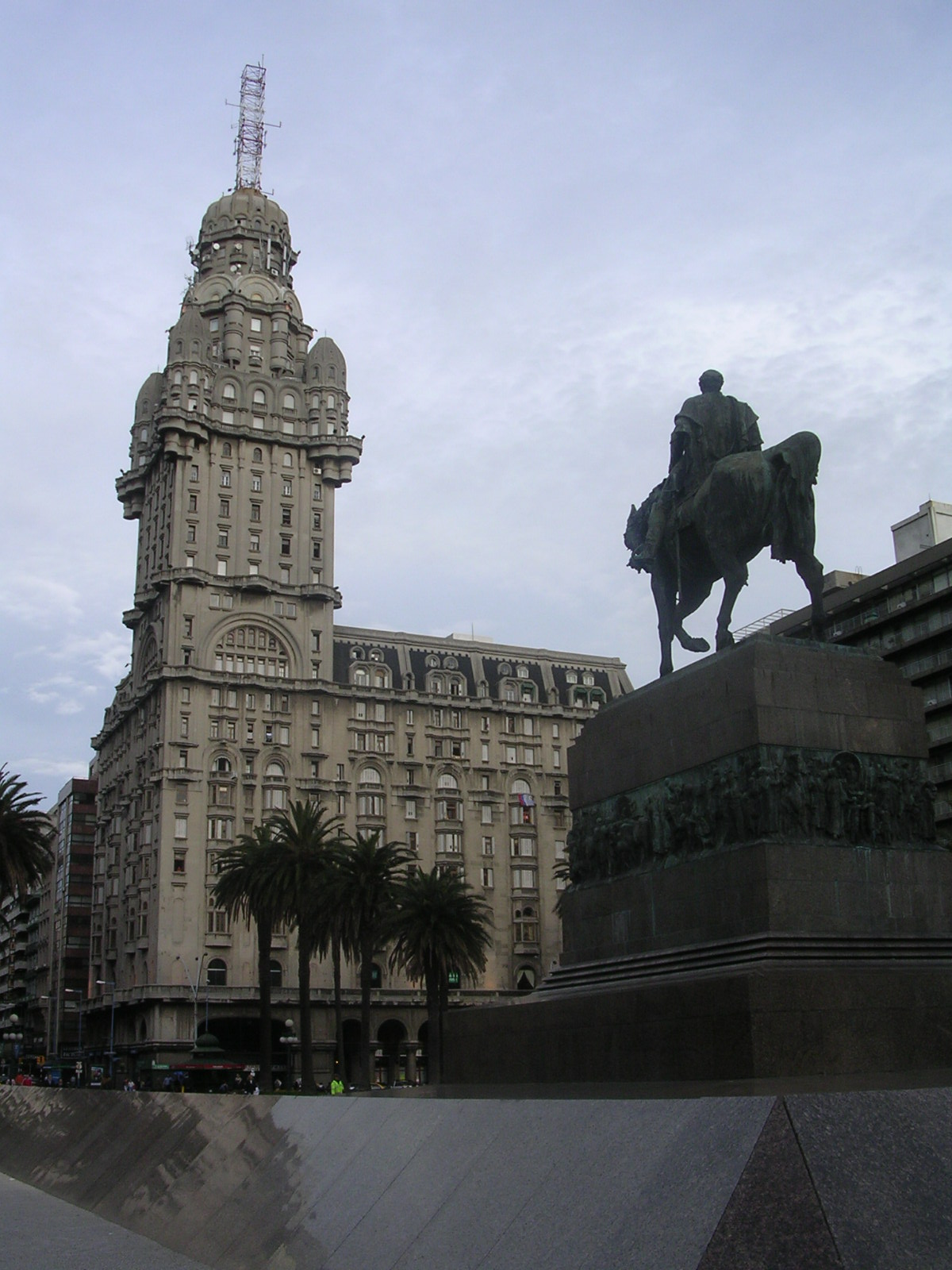 Vue de la statue d'Artigas, place de l'Indépendance à Montevideo. (photo personnelle) Luisvassy